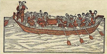 Kopie durch Manesse2 aus der Zentralbibliothek Zürich des Originalwerkes aus dem Jahr 1576